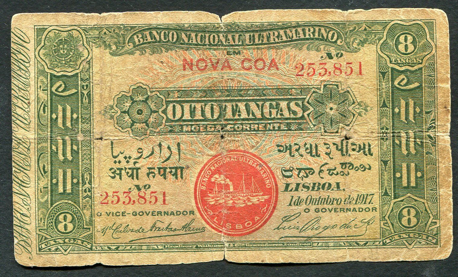 Nova Goa 253851